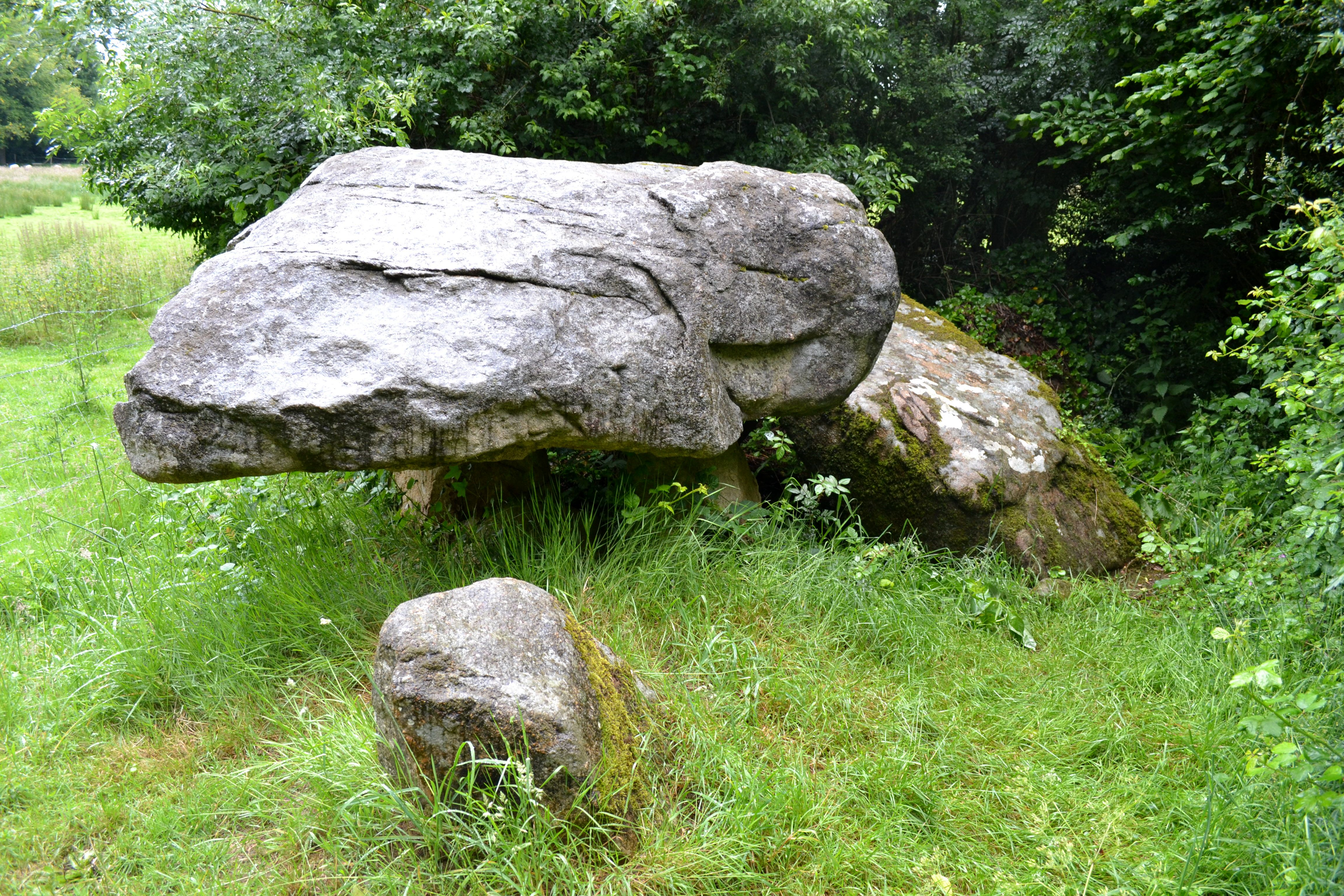 Dolmen de la Voie, Le Pin (79).